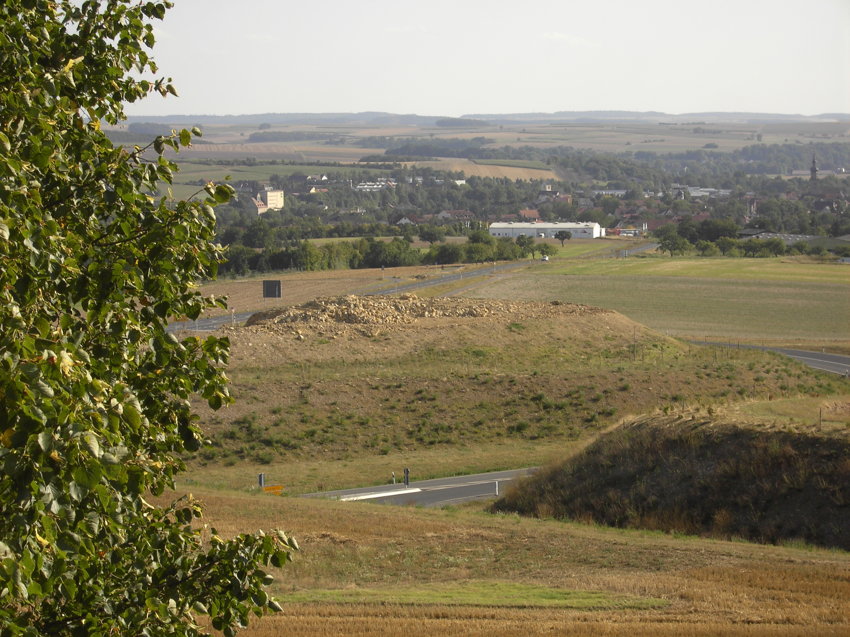 Hügel des Erdaushubes im fortgeschrittenen Stadium der Abtragung. Hinten die ehem. B19, von vorne rechts kommend die B285n und im Viertelkreis die Verbindungsstraße. Im Hintergrund Mellrichstadt.